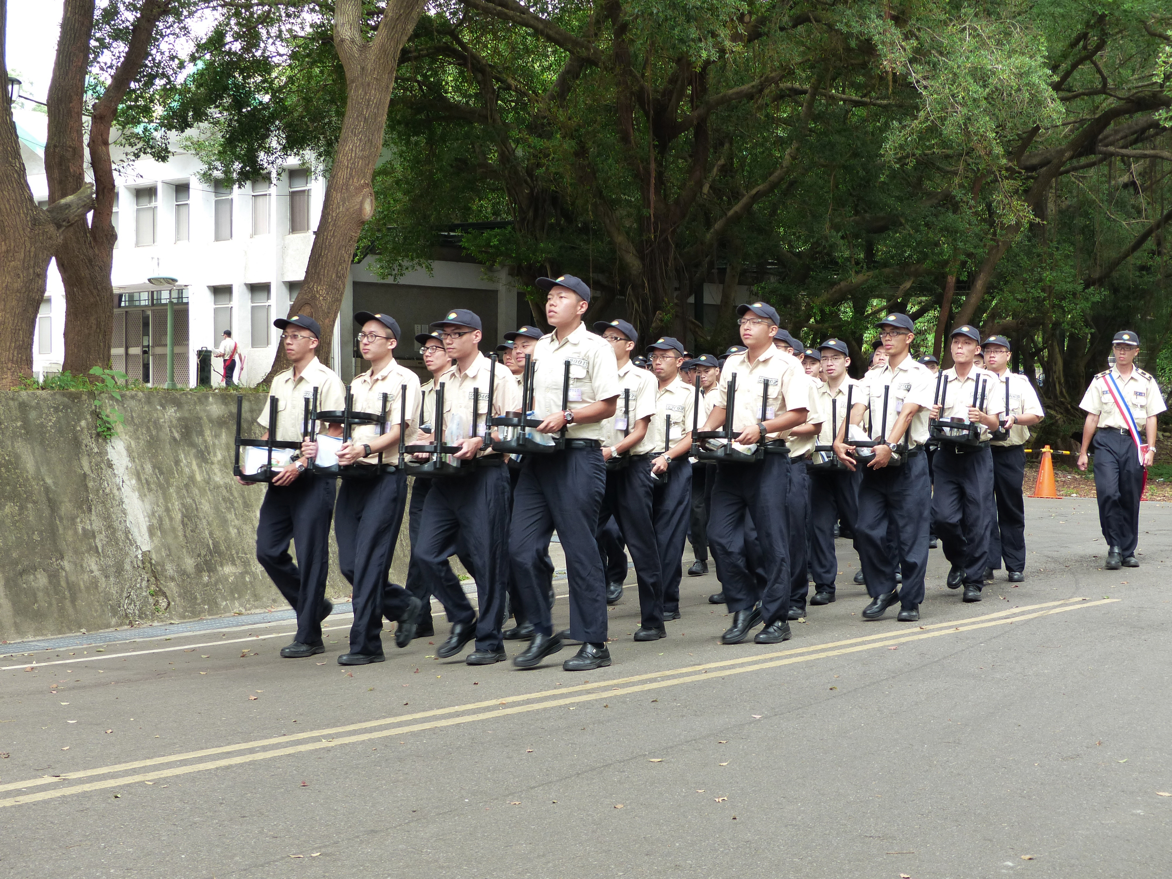 持凳行進的替代役訓練班第六大隊第二十三中隊役男與帶隊值星分隊長，後方建築為第四大隊餐廳。